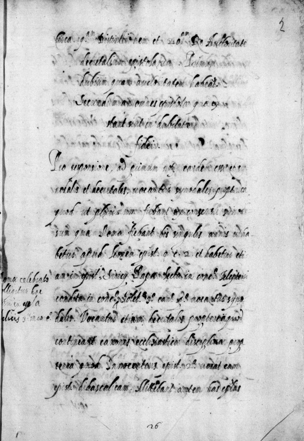 manuscript in lat. Milano, Biblioteca Ambrosiana, Fondo manoscritti, ms. H 153 inf. - secoli 16.-17. - ff. 98 : cartaceo ; 280x200 mm. ((Manus Online data il codice "1596-1630"